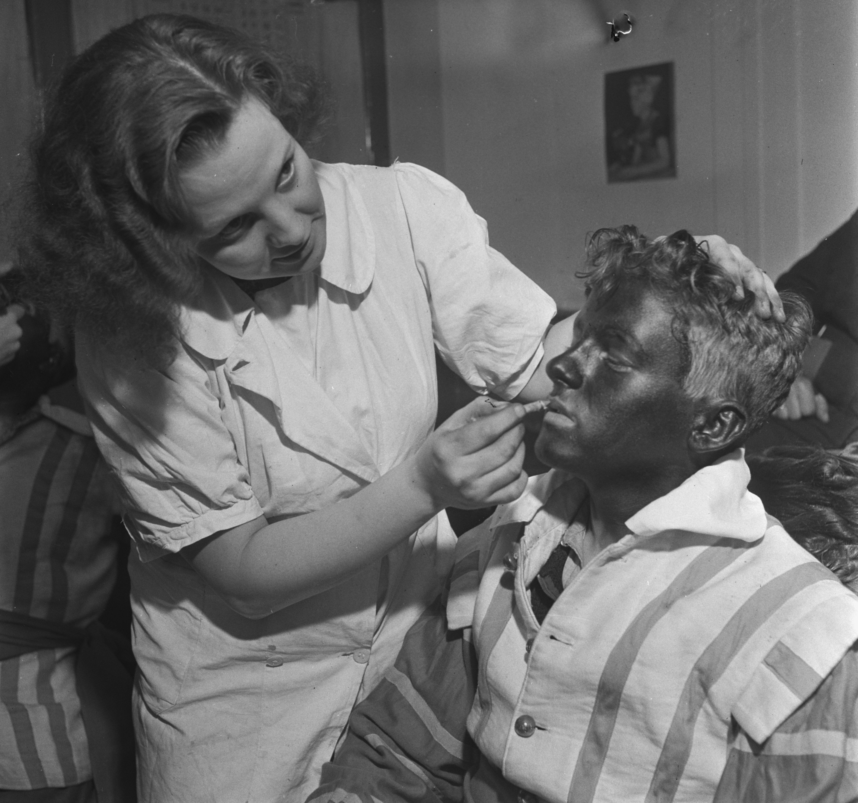 Collectie / Archief : Fotocollectie Anefo Reportage / Serie : [ onbekend ] Beschrijving : Aankomst Sint Nicolaas te Amsterdam. Zwarte Piet wordt geschminkt Datum : 30 november 1945 Locatie : Amsterdam, Noord-Holland Trefwoorden : schminken, sint nicolaas, sinterklaasfeesten Persoonsnaam : Sinterklaas Instellingsnaam : Zwarte Piet Fotograaf : Haren Noman, Theo van / Anefo Auteursrechthebbende : Nationaal Archief Materiaalsoort : Negatief (zwart/wit) Nummer archiefinventaris : bekijk toegang 2.24.01.03 Bestanddeelnummer : 901-1674